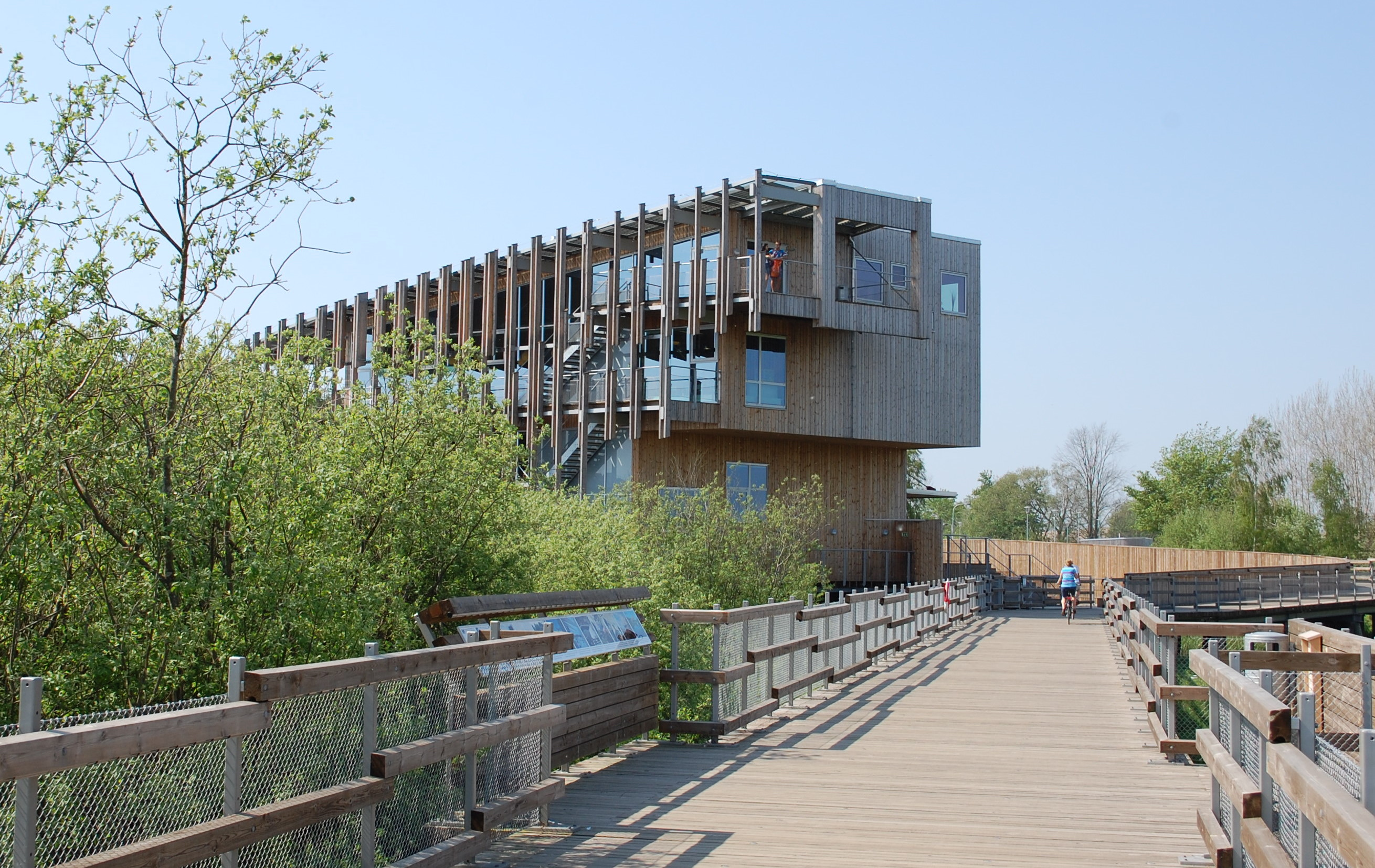 Naturum in Kristianstad